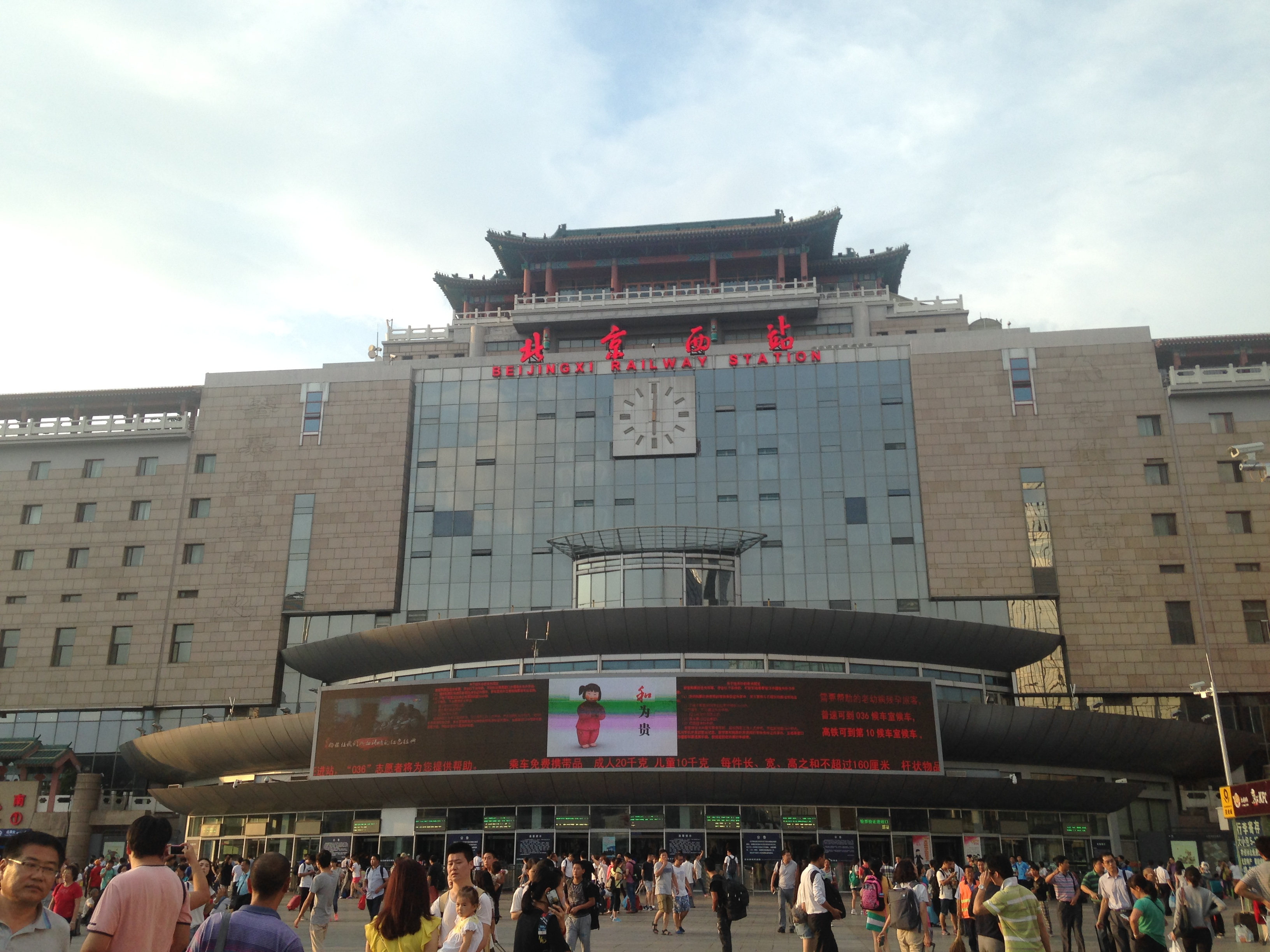 北京西駅の駅舎